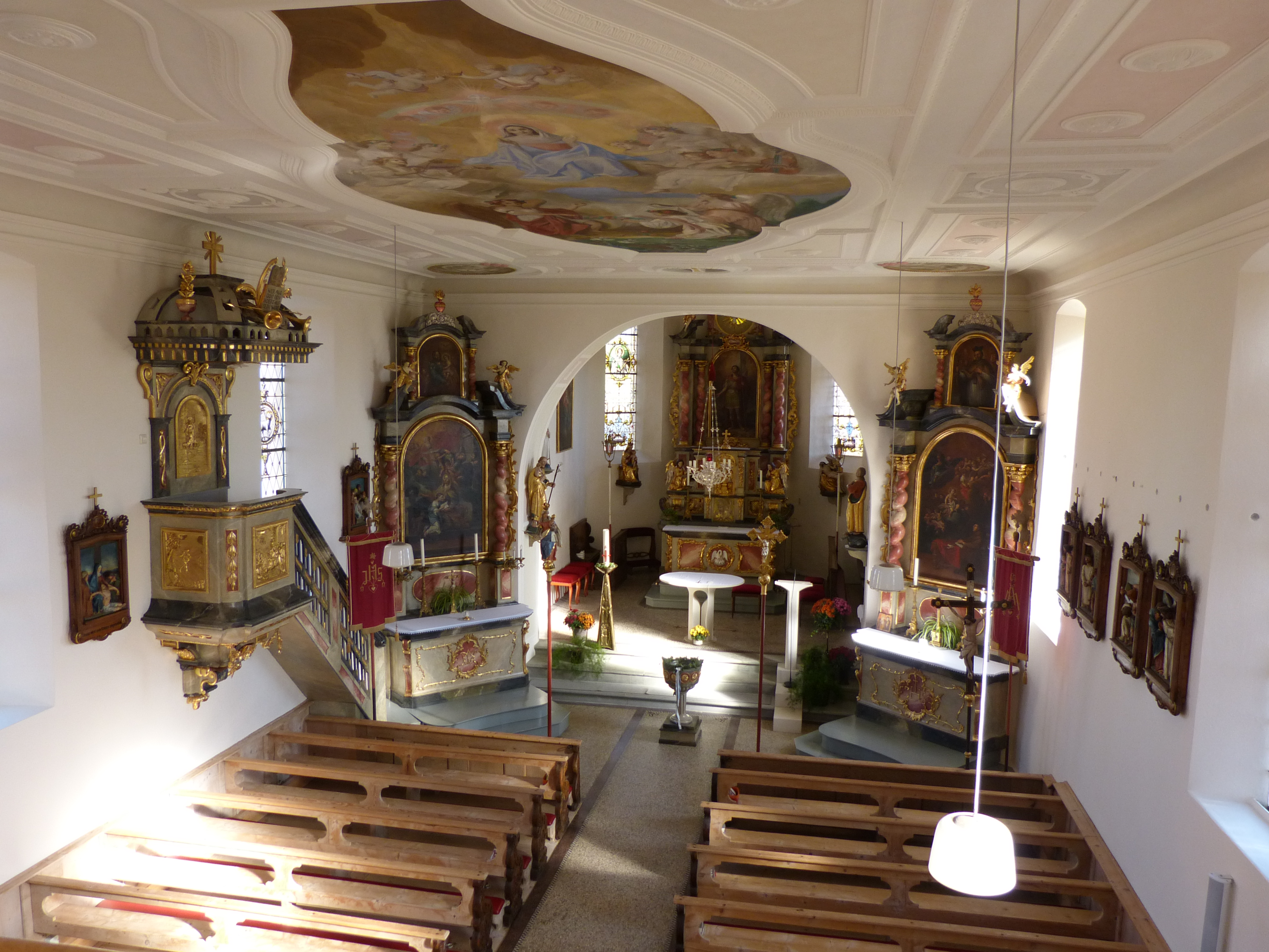 St. Mauritius in Muthmannshofen, Landkreis Oberallgäu, Bayern